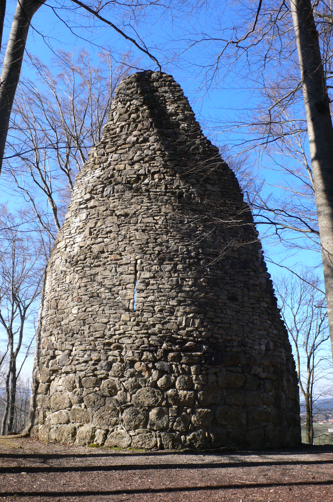 Tour ronde à l'extrémité sud du site des vestiges médiévaux de Bossonnens